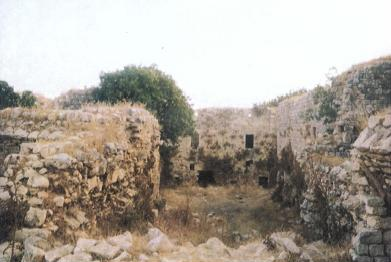 قلعة دوبيه - جنوب لبنان (جبل عامل) وتقع بين بلدتي شقرا وميس